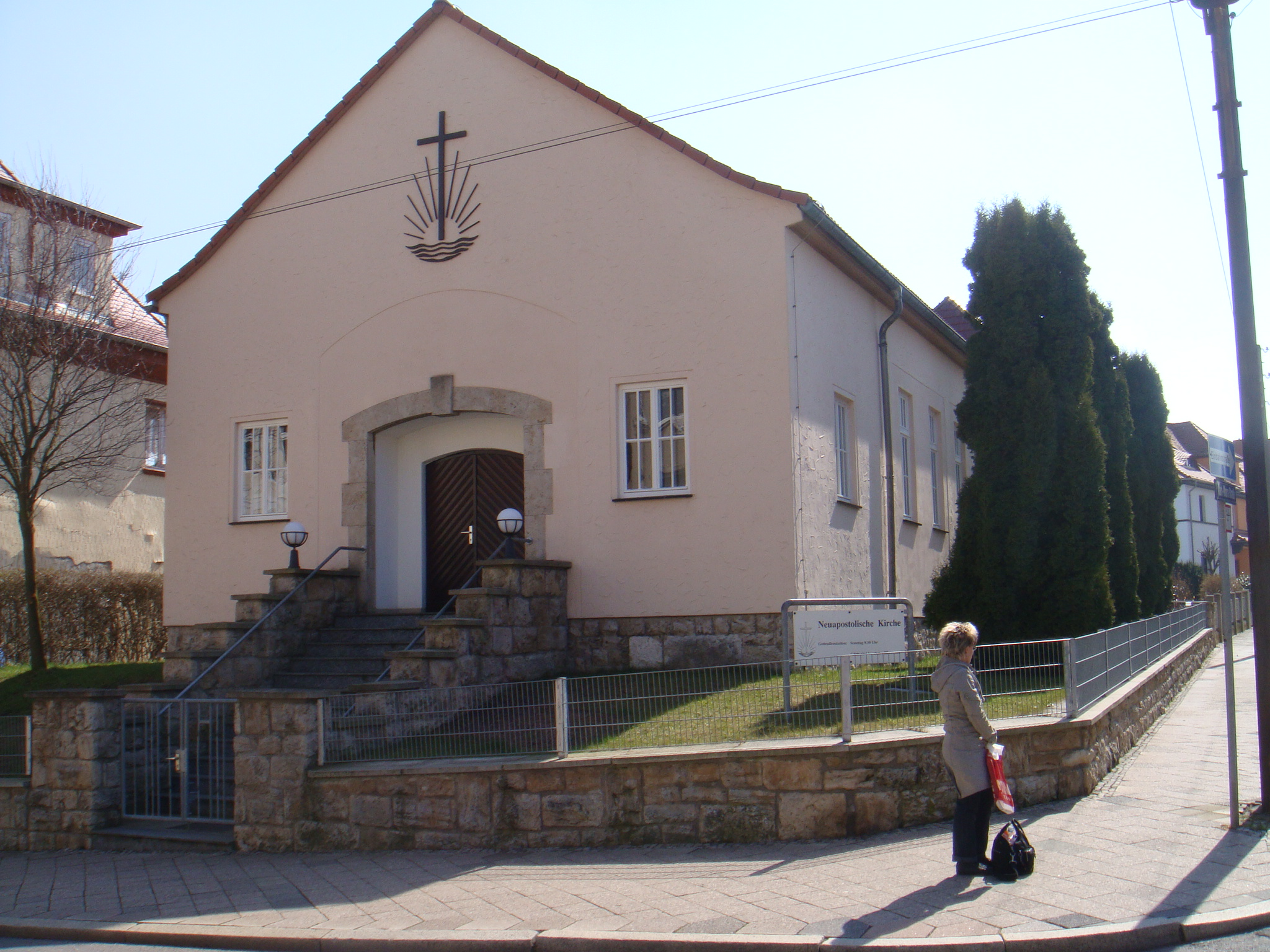 Ansicht der Neuapostolischen Kirche Apolda